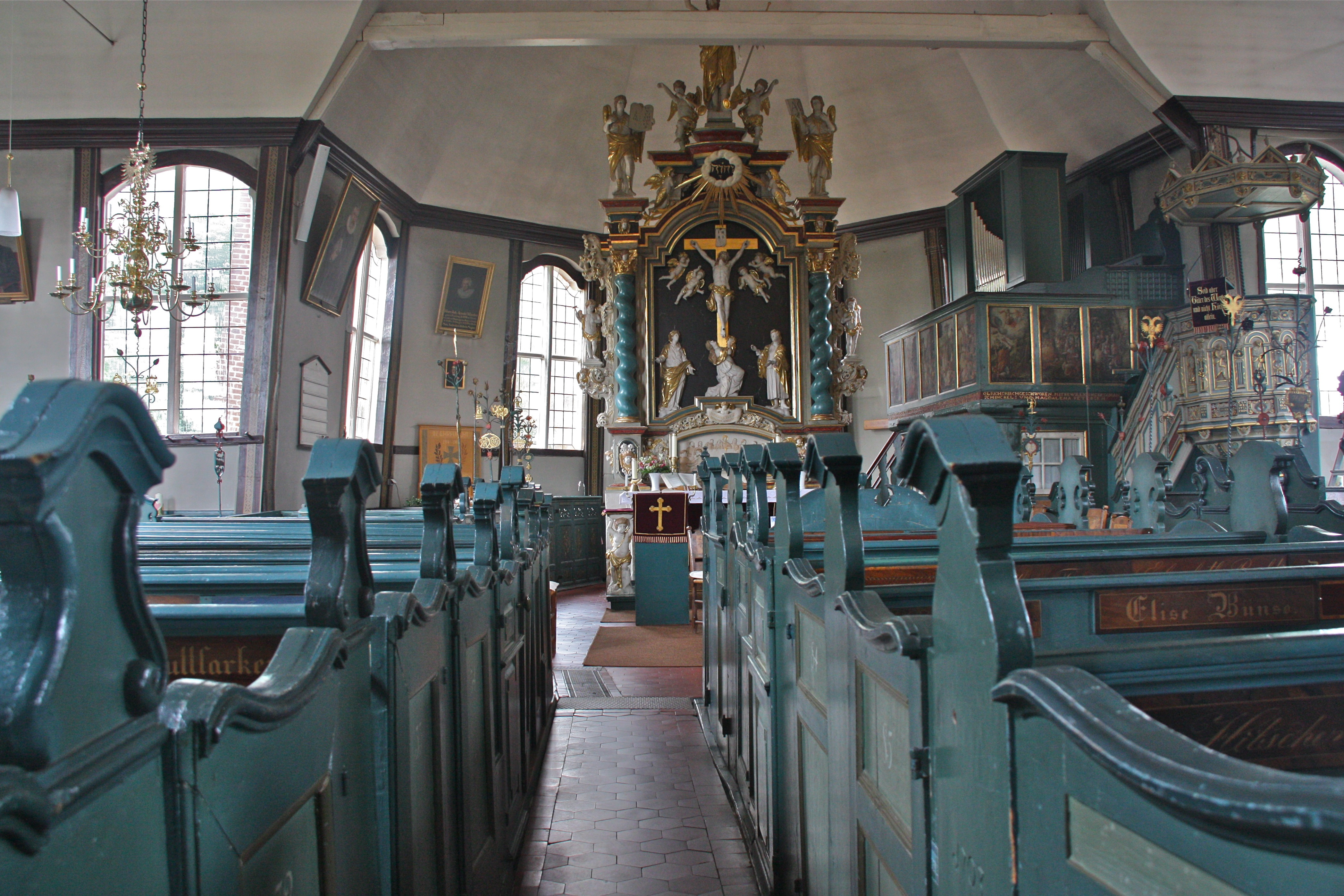 Hamburg, Curslack, St. Johannis-Kirche, InnenraumThis is a photograph of an architectural monument.